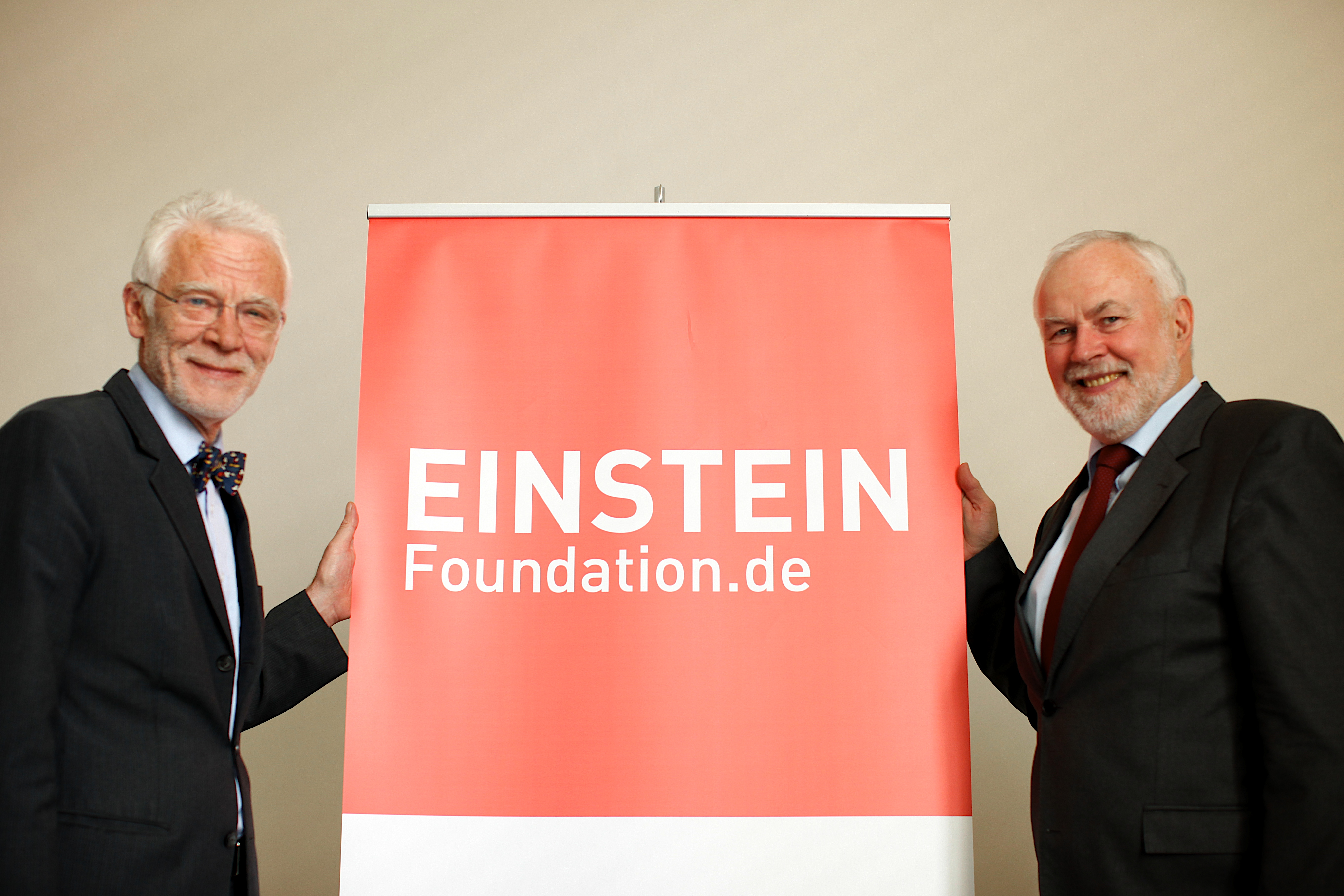 Prof. Dr. Dr. h.c. mult. Zöllner übergibt den Vorstandsvorsitz der Einstein-Stiftung an Prof. Dr. Dr. h.c. mult. Grötschel